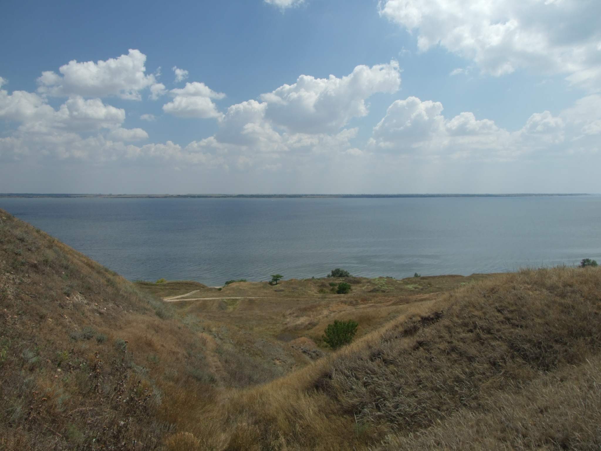 Стародавнє місто Ольвія